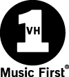 Zweites Sendelogo von VH1